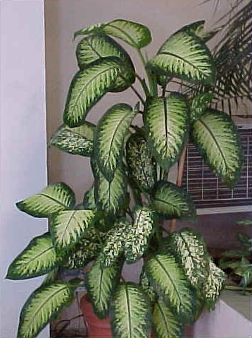 Dieffenbachia seguine L'immagine rappresenta una pianta di Dieffenbachia seguine La foto è stata tratta dal sito